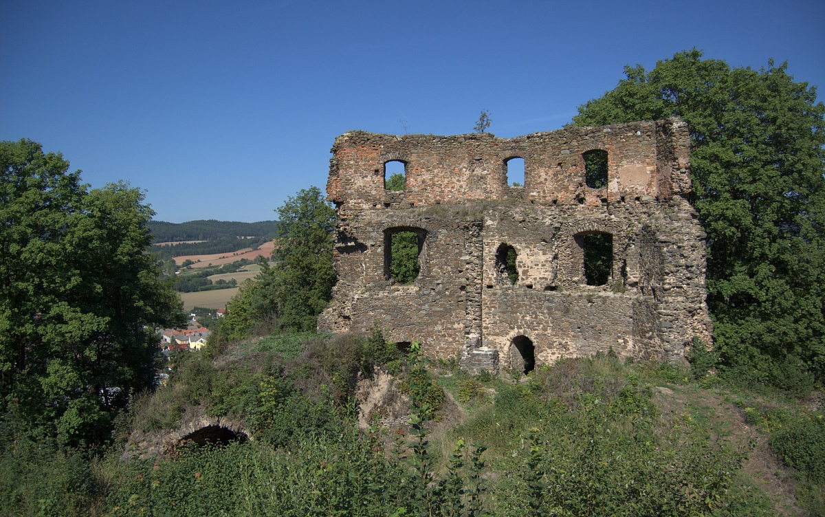 Hrad Starý Cimburk, zřícenina (Městečko Trnávka), Městečko Trnávka